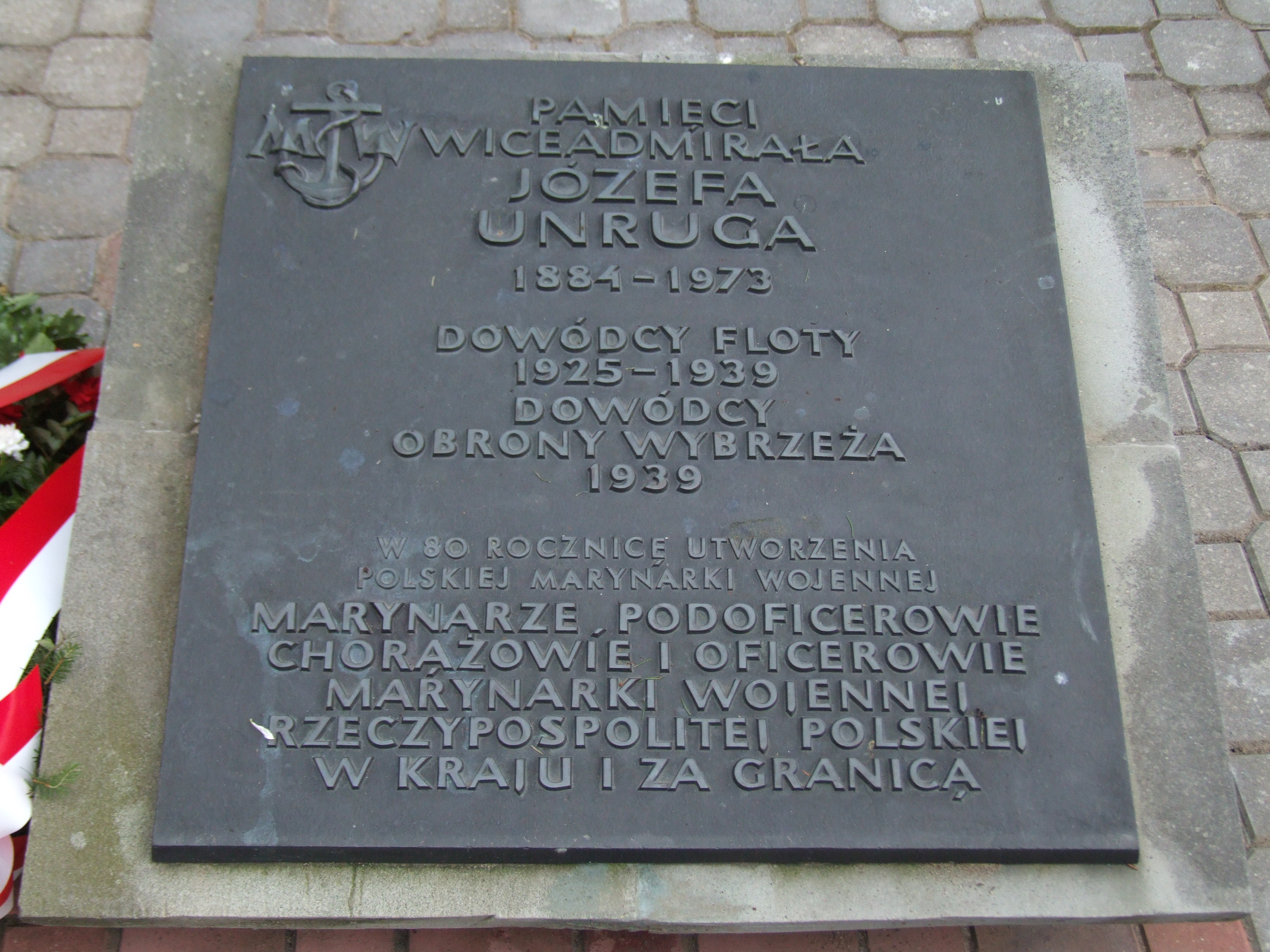 Gdynia-Oksywie Cmentarz Marynarki Wojennej